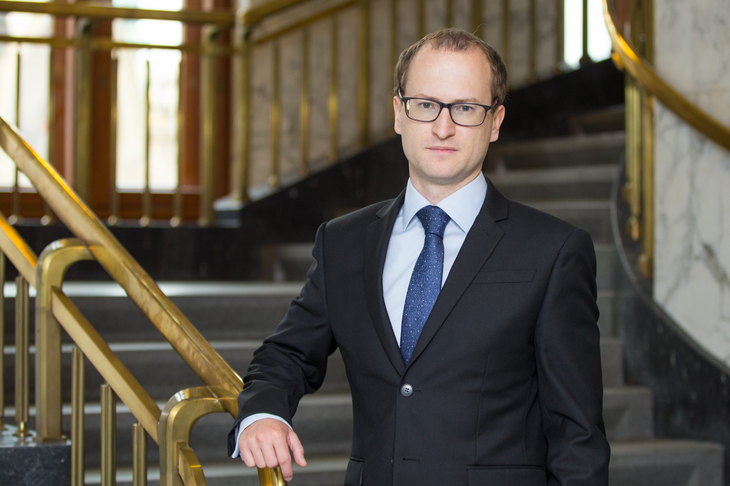 Ekonom Tomáš Havránek v České národní bance